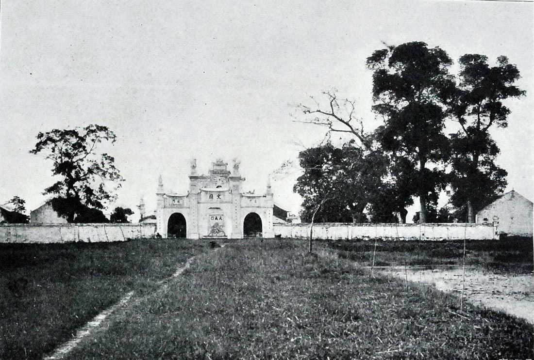 Ảnh chụp cổng vào Văn Miếu của Nam Định, thời Pháp thuộc (tức giai đoạn cuối thời Nguyễn).